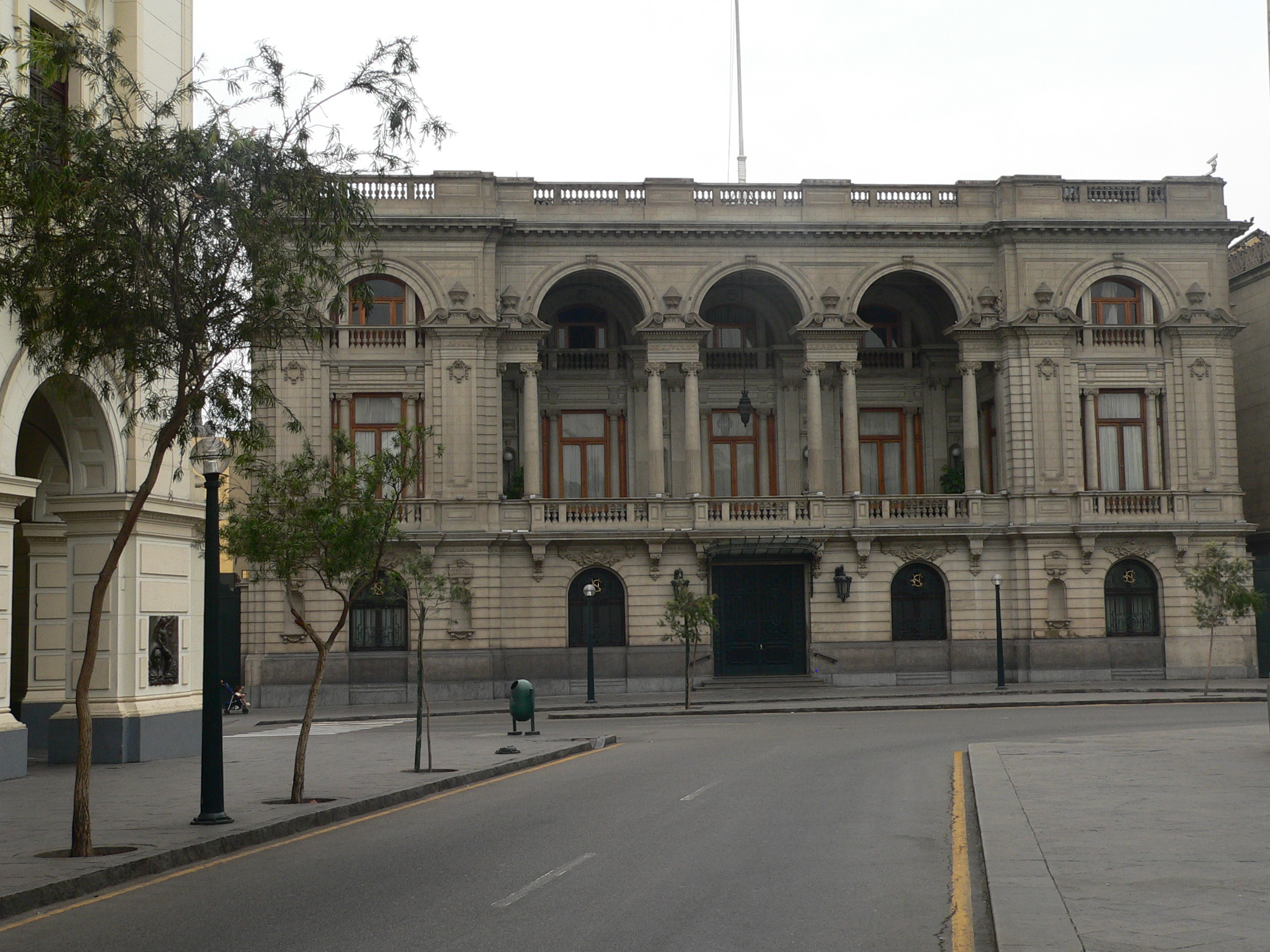 Fachada del Club Nacional en Lima. Foto tomada por Manuel González Olaechea y Franco